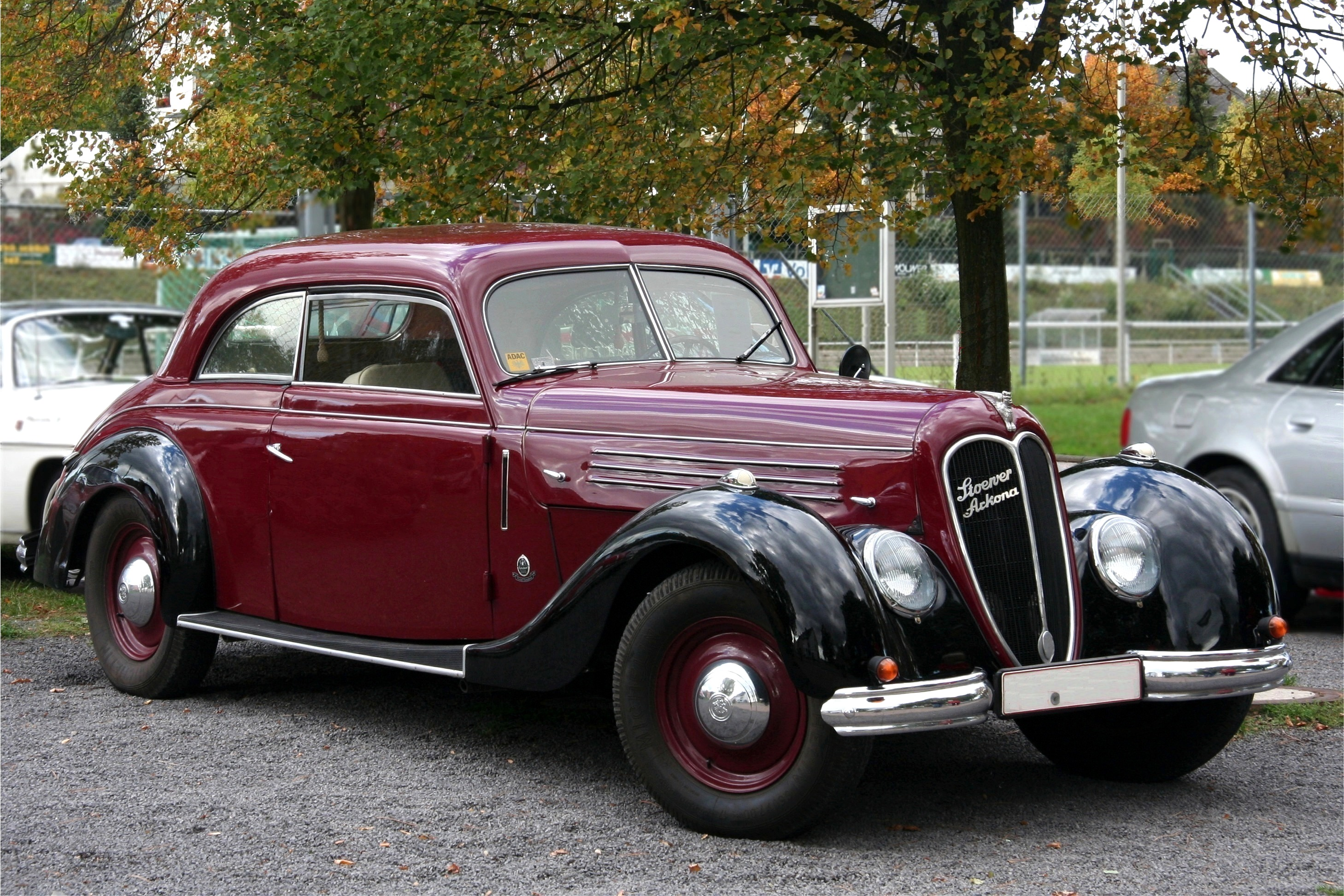 Stoewer Arkona, Baujahr 1940